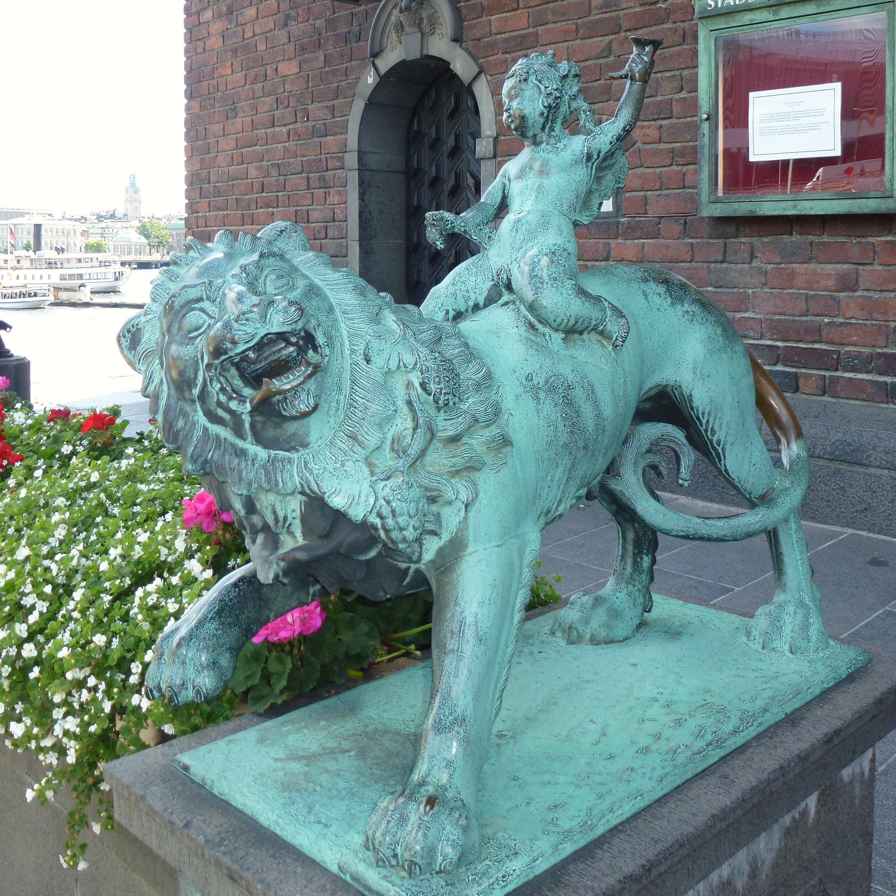 Baccus ridande på lejon utanför Stadshuskällaren, skulptör Ansgar Almquist